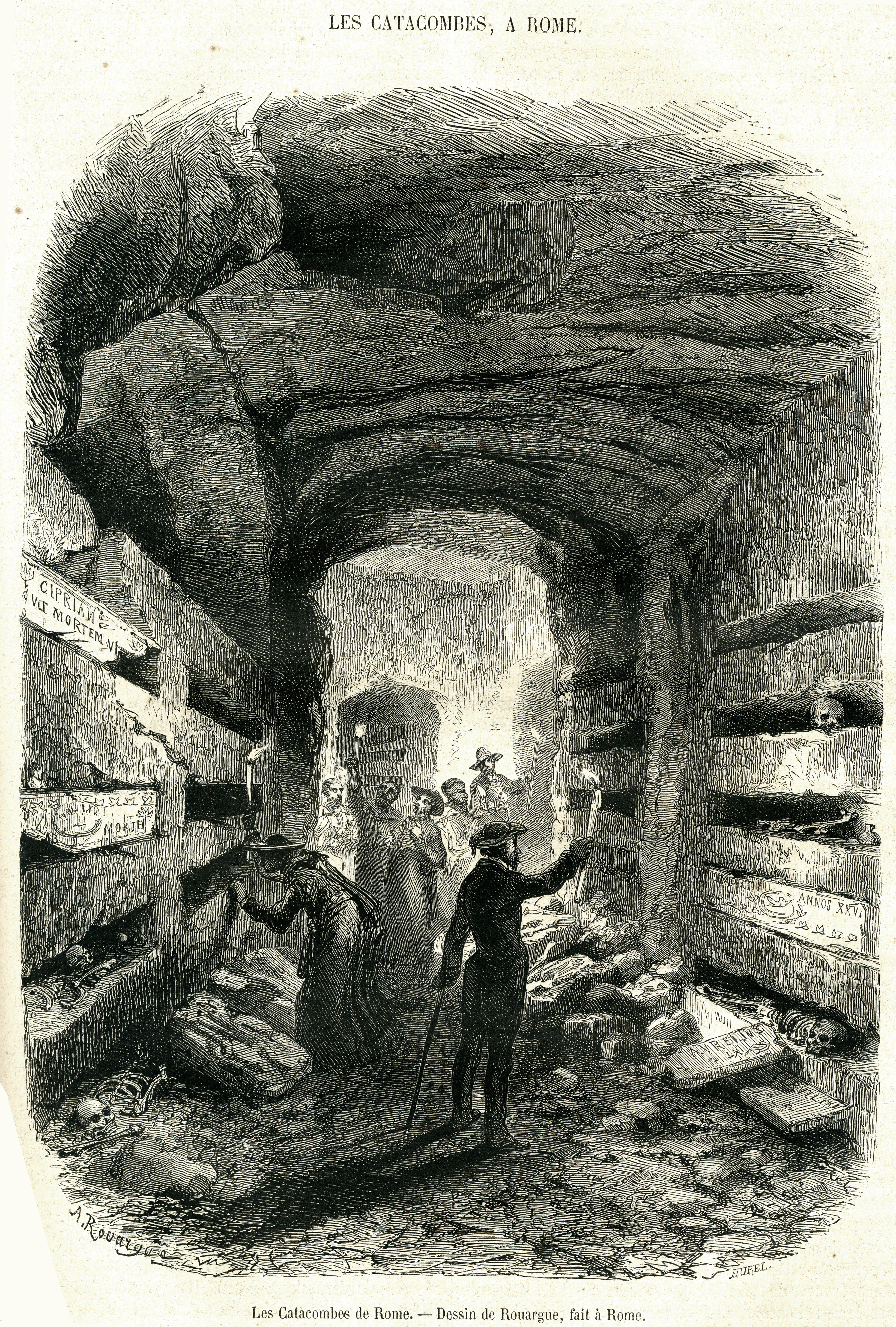 An engraving from Le Magasin Pittoresque,1860s